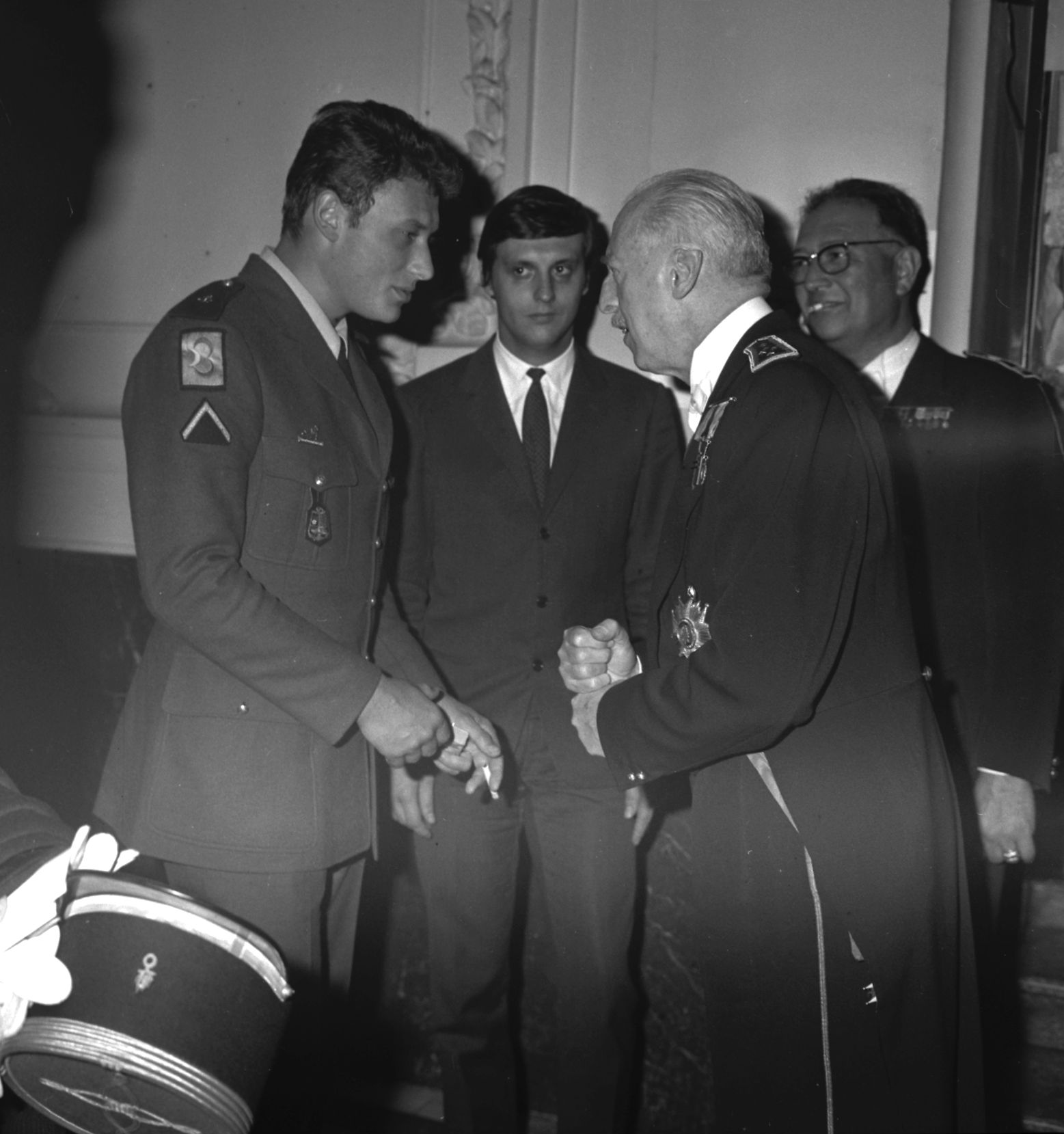 Théâtre du Capitole ? 2 juin 1965. Vue de Johnny Hallyday avec le général Koenig.